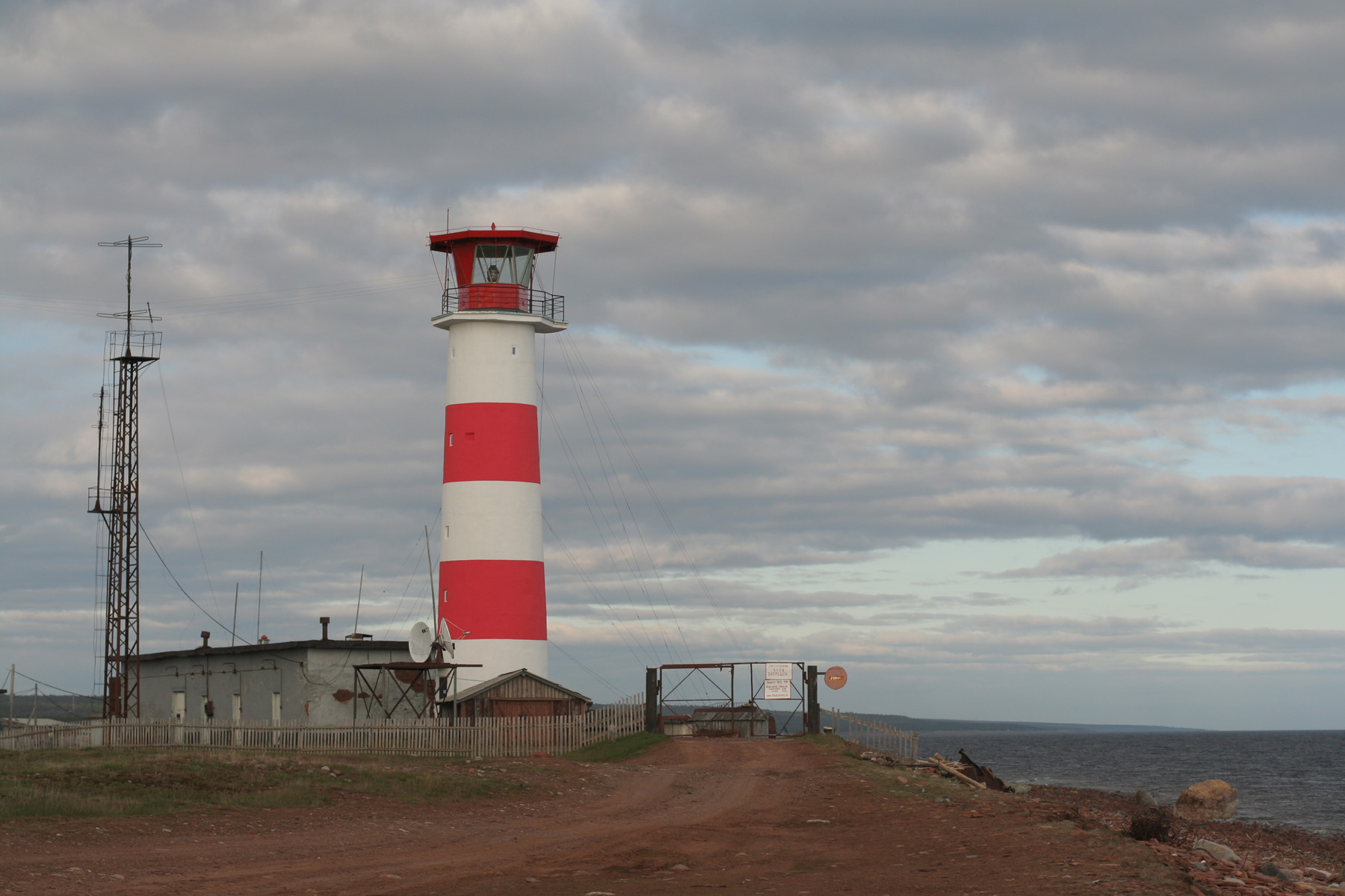 Маяк в Кашкаранцах